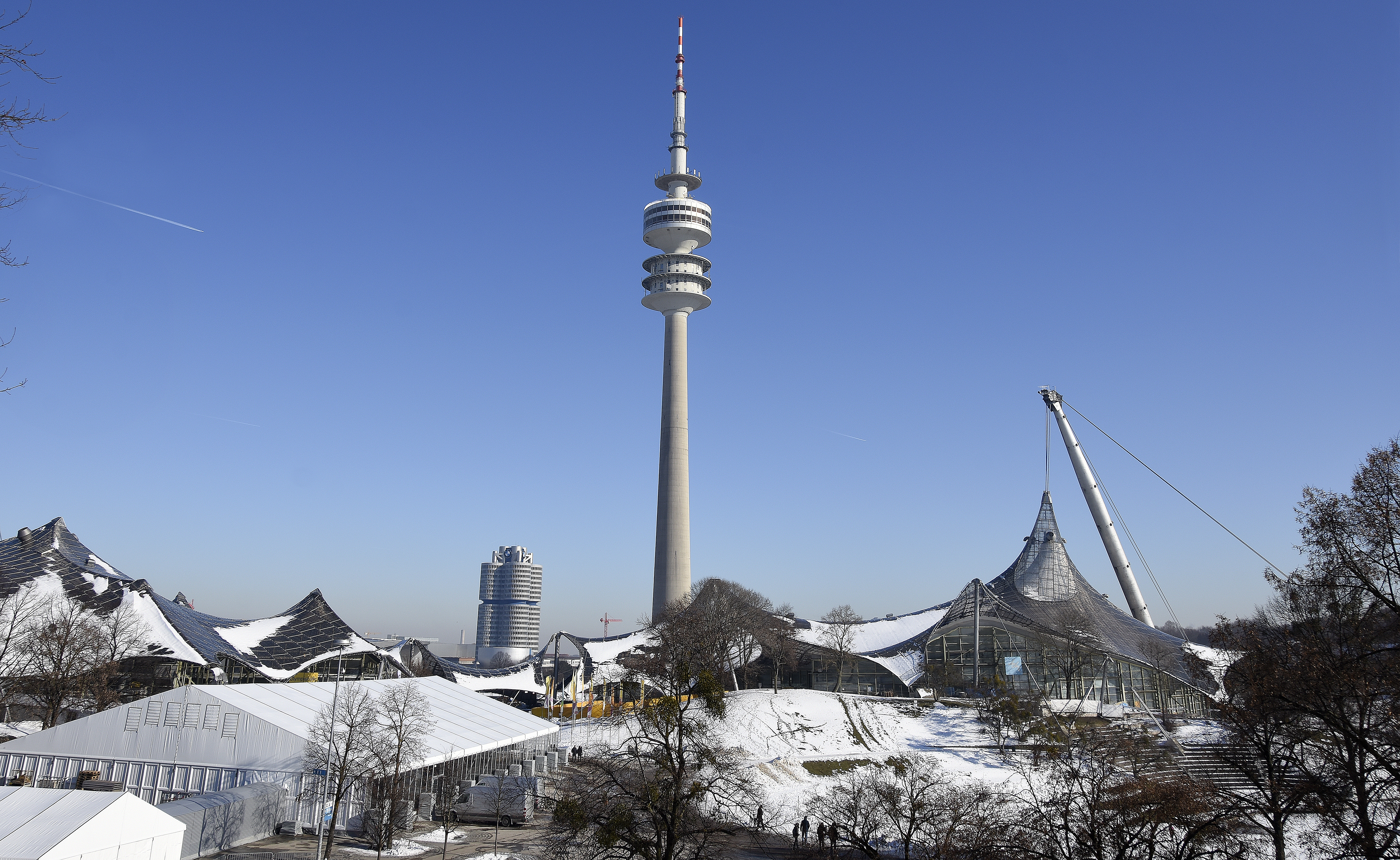 De Olympiatoren in het Olympiapark te München